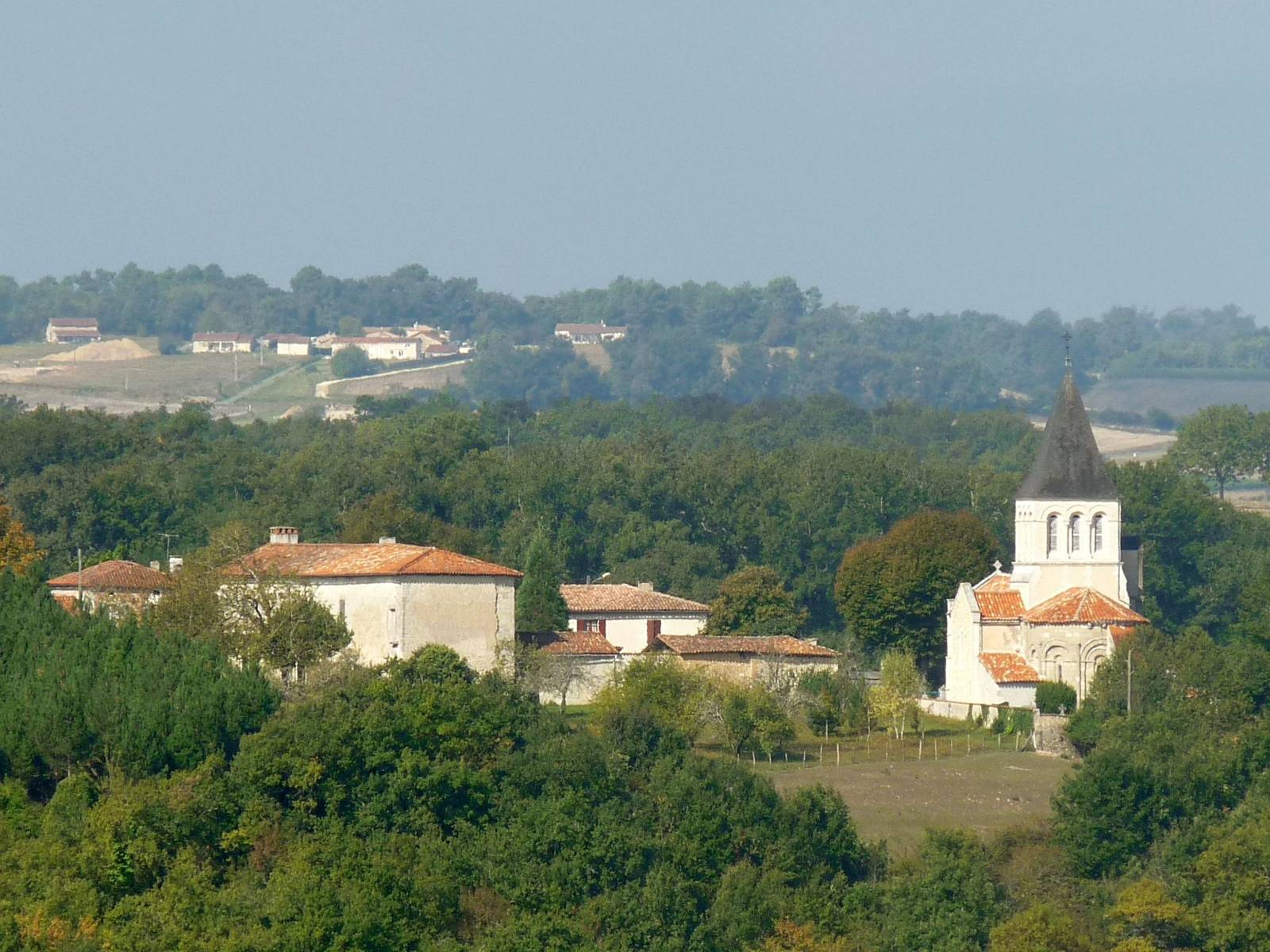 vue de Curac (16), France